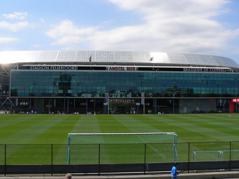 Feyenoord Stadium / Feijenoord Stadion / De Kuip